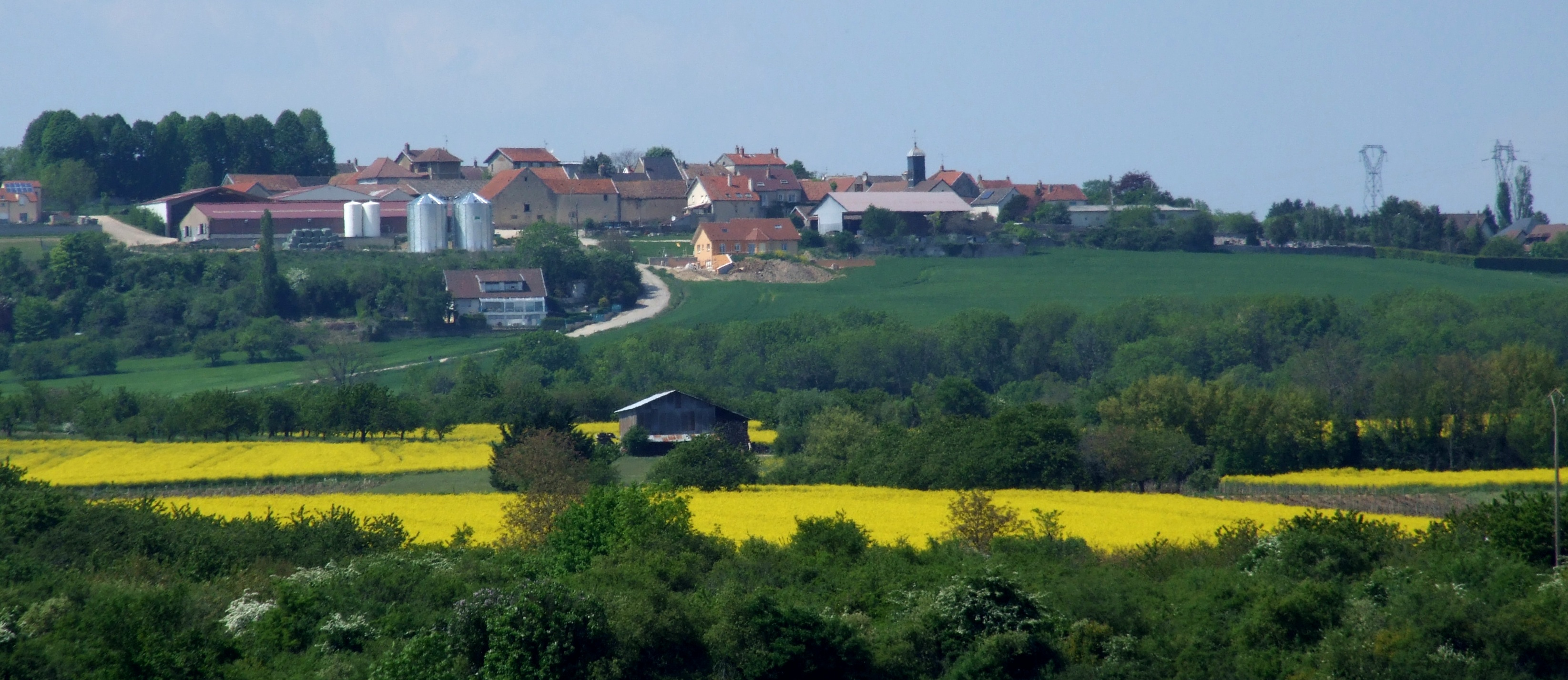 Hauteville-lès-Dijon vu de Fontaine-lès-Dijon, Côte-d'Or, Bourgogne,FRANCE